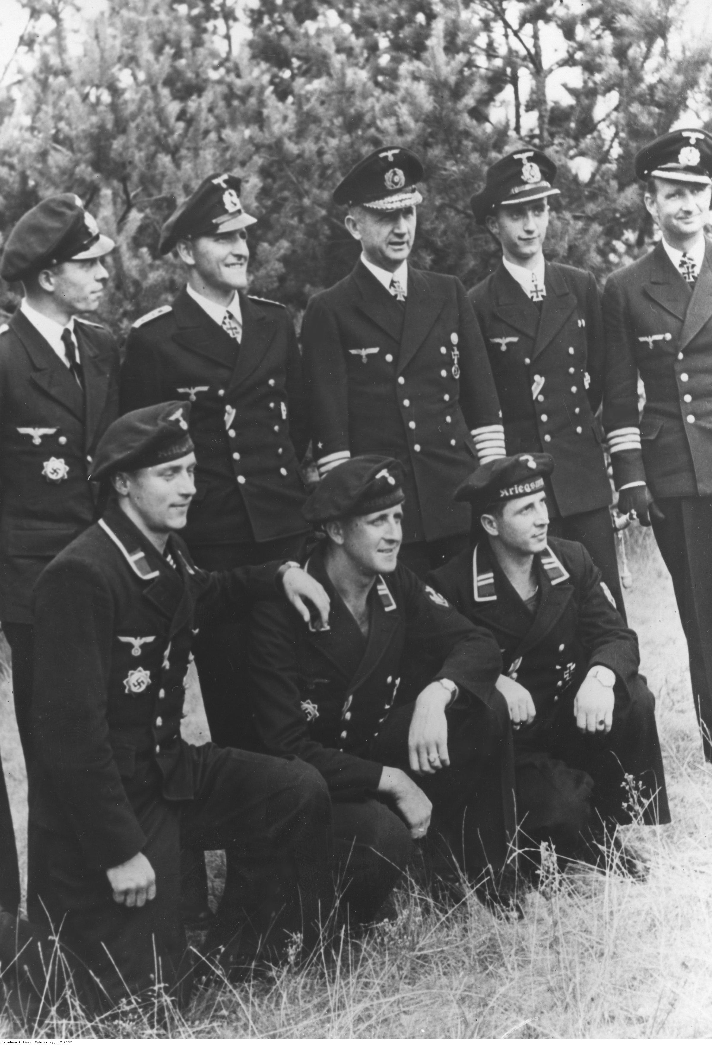 Admirał Karl Donitz (3. z lewej w drugim rzędzie) w otoczeniu dowódców i marynarzy niemieckiej marynarki wojennej. Widoczni m.in.: podporucznik Alfred Vetter (2. z prawej w drugim rzędzie), komandor podporucznik Fritz Frauenheim (1. z prawej w dugim rzędzie) oraz marynarz Herbert Berrer (2. z lewej w dugim dzędzie). Fotografia grupowa.